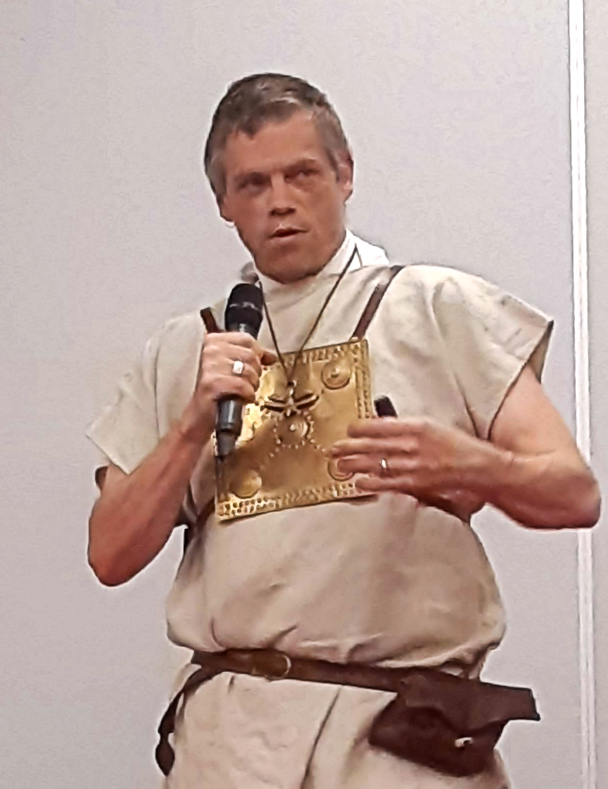 Pisarz Ben Kane, Pyrkon 2019 w Poznaniu, Polska